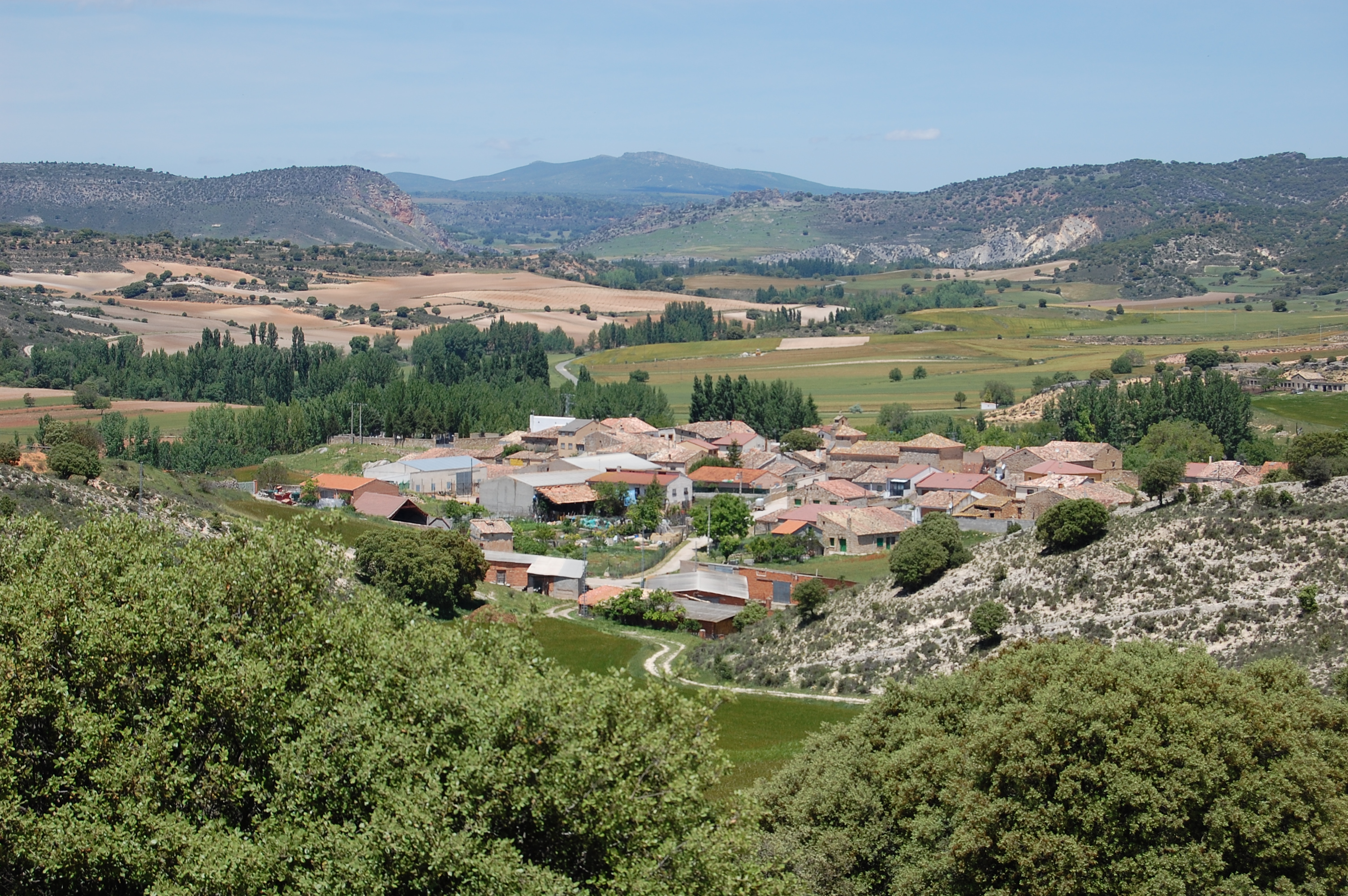 Viana de Jadraque